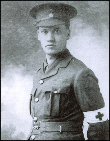 Christopher Nevinson v uniformě Červeného kříže - Red Cross uniform, 1914-1915 Fotograf neznámý